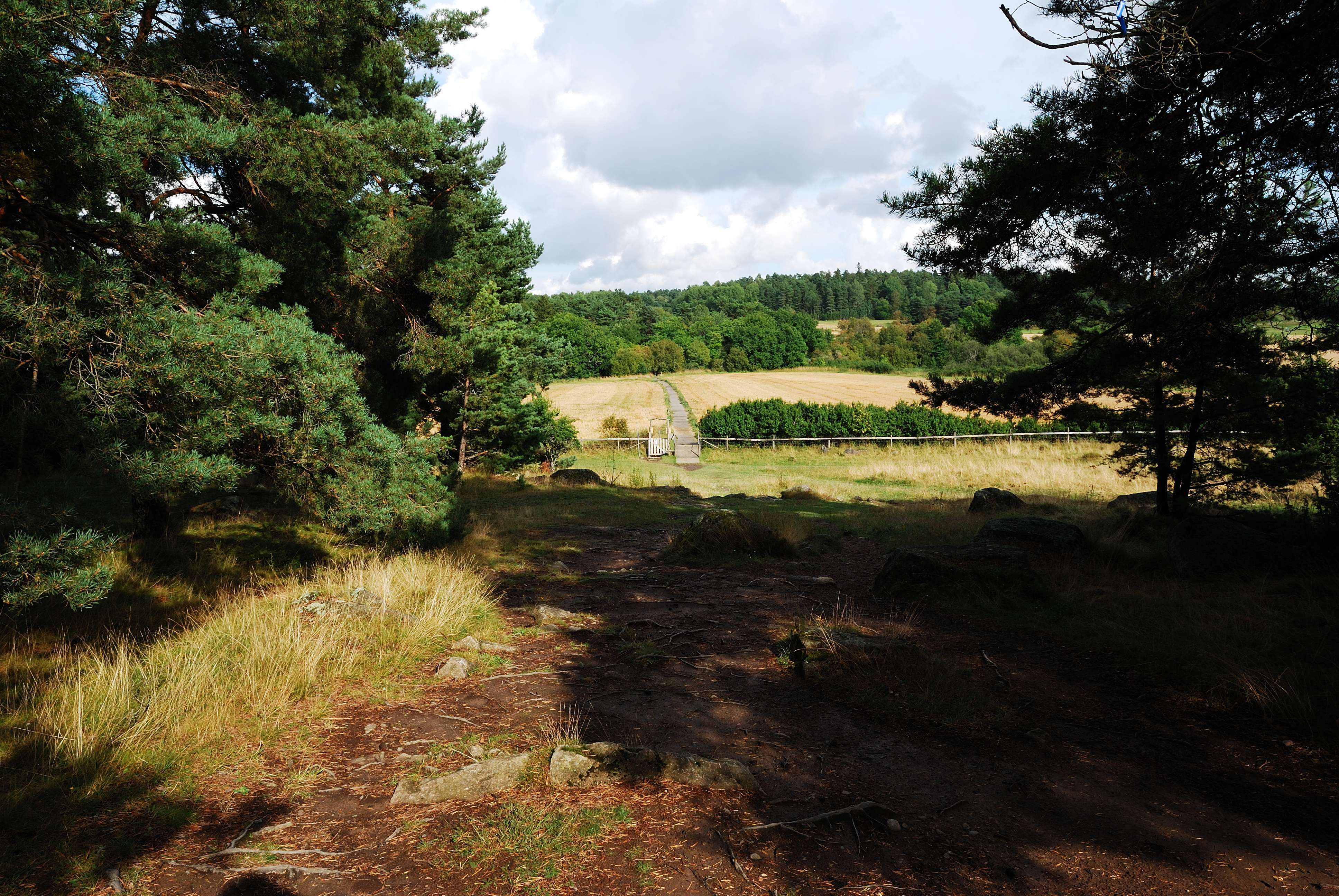 Ned mot Hågaån från Hågahögen, Uppsala.